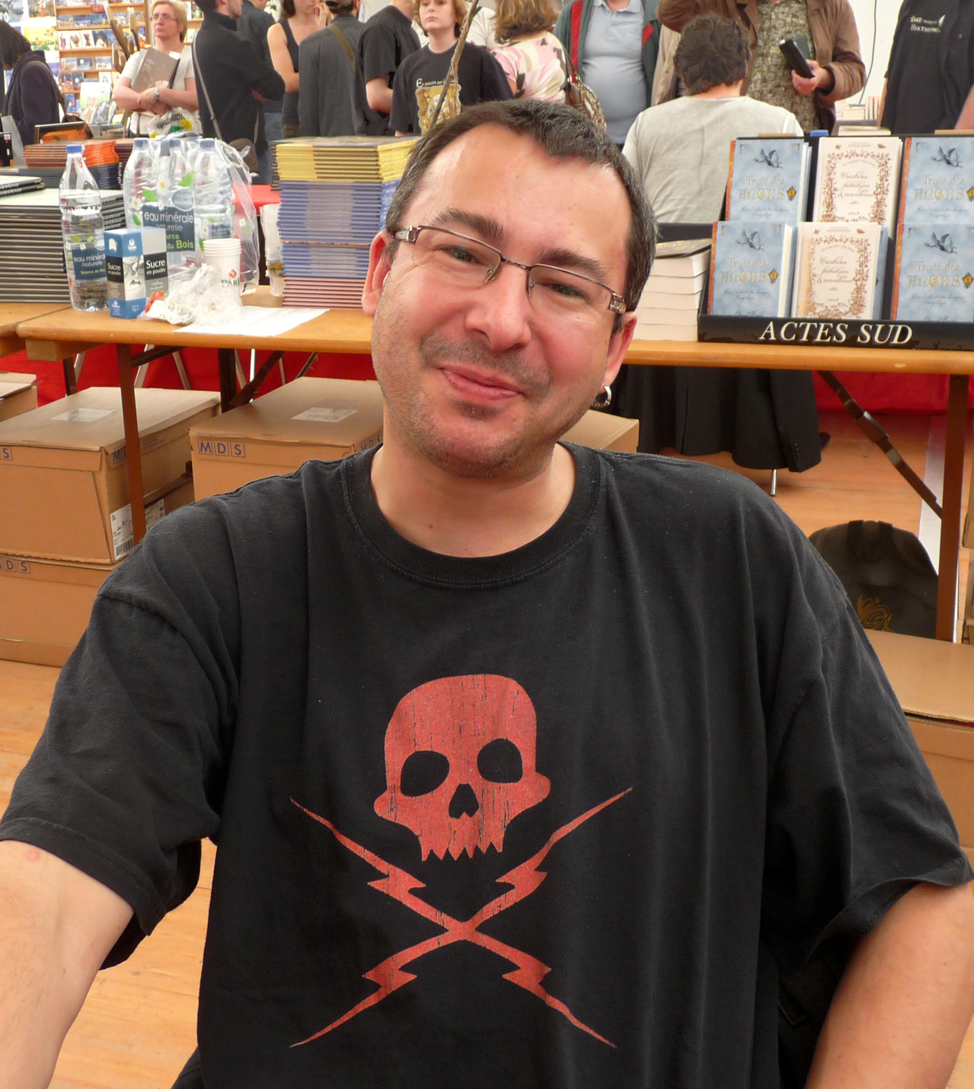 Thomas Day aux "Imaginales 2010" (Épinal, Vosges, France).